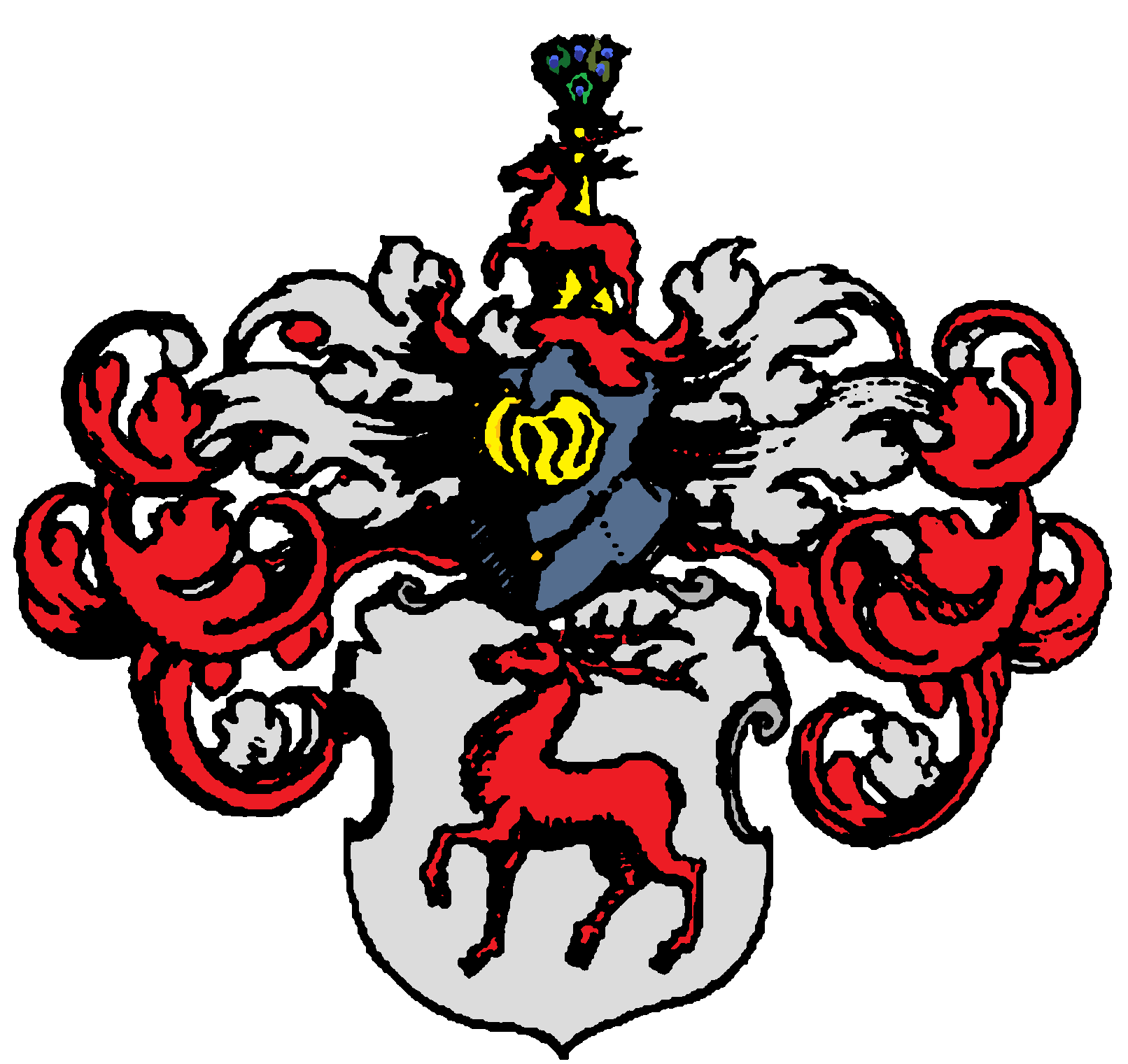 Wappen der Grafen von Spiegelberg, vereinzelt und daher heraldisch korrekt gespiegelt, dann nach überlieferter Blasonierung koloriert, aus